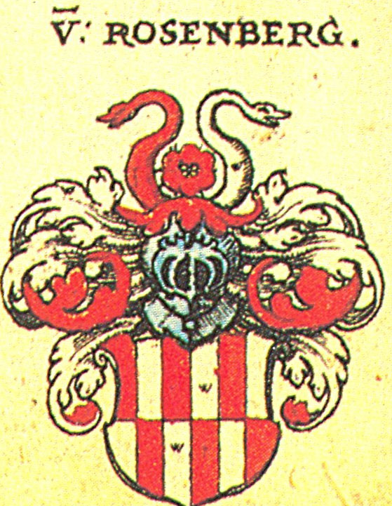 Wappen der Fränkischen Adelsfamilie Rosenberg